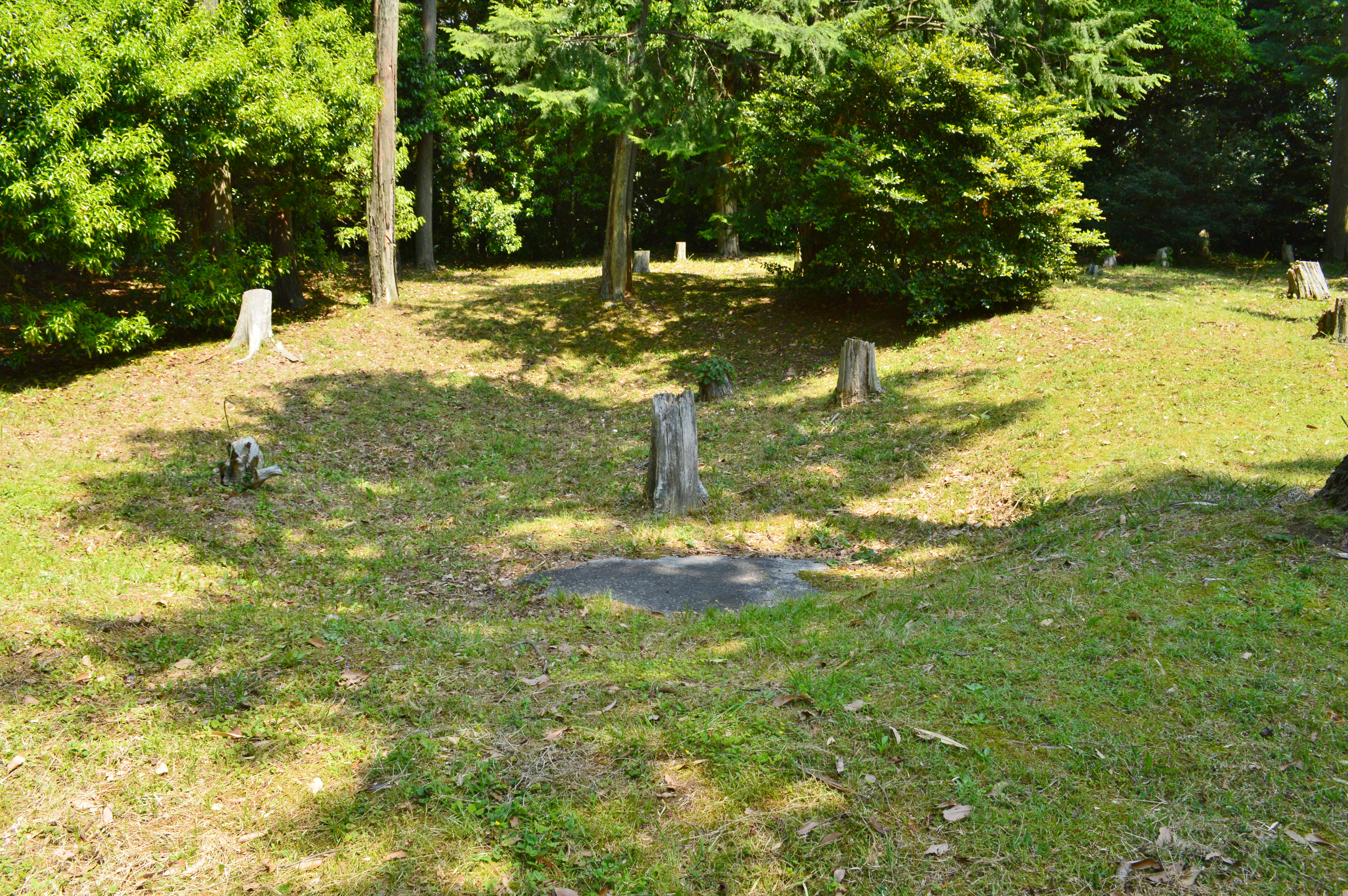 室宮山古墳 後円部北石室